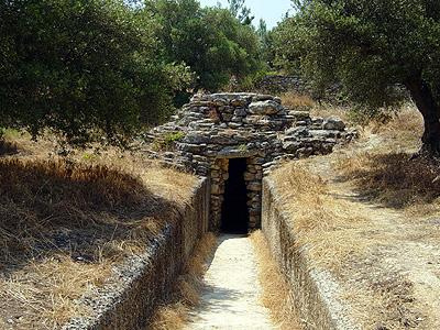 Mehr Informationen zu Kreta auf meiner Homepage: Kreta – Mein erstgeborenes Land